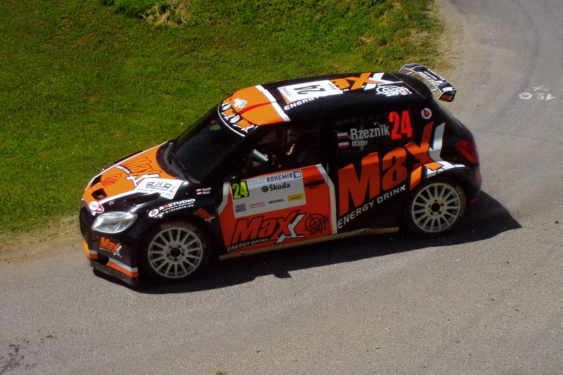 Rally Bohemia 2010 RZ Sychrov